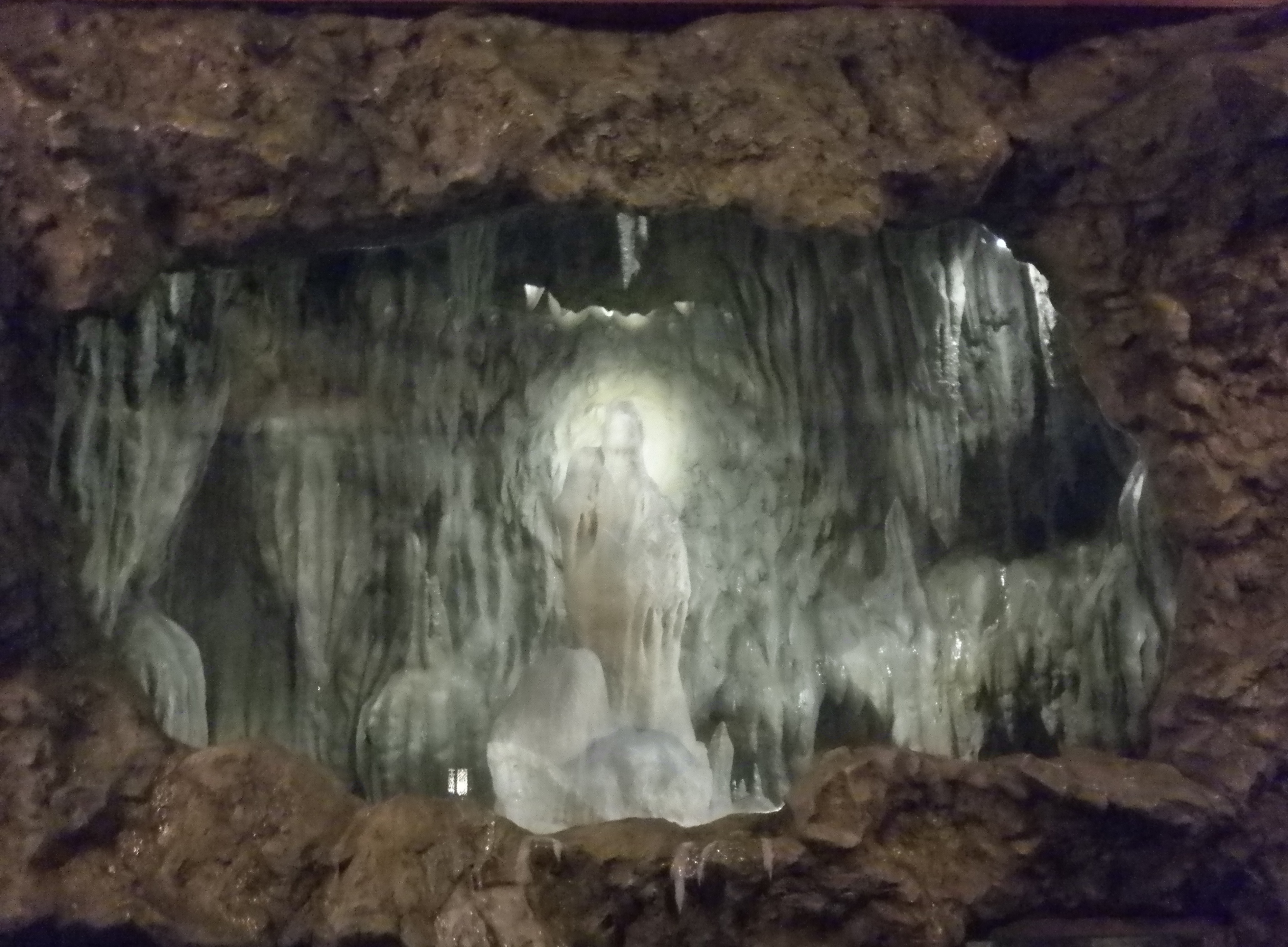 中文（台灣）: 萬壽山龍泉寺圓通寶殿供奉中華民國60年發掘出的鐘乳石送子觀音。